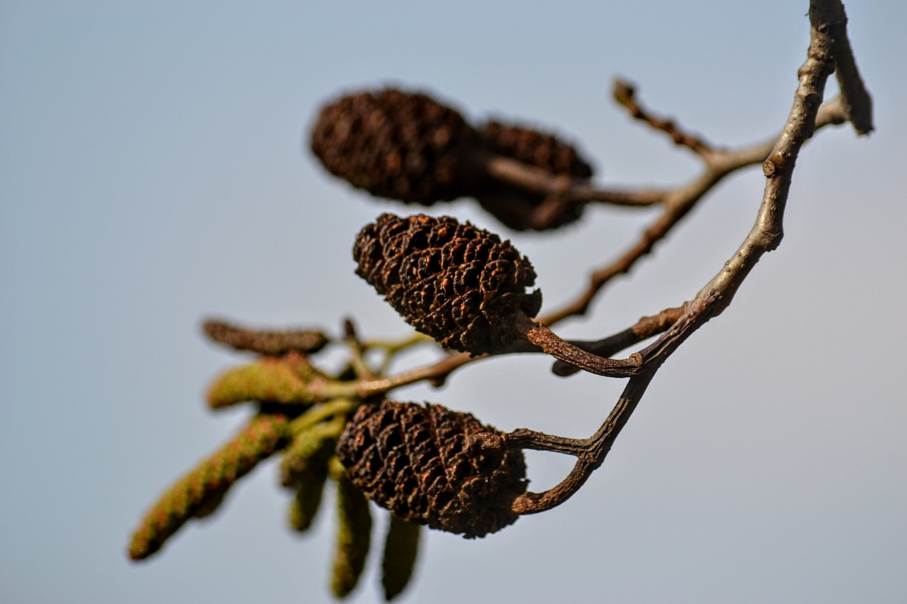 Olsza sercowata